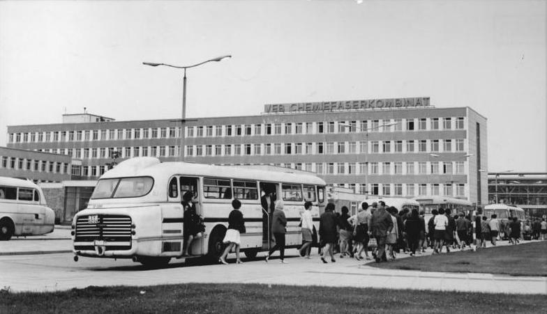 Zentralbild Großmann 30.8.1968 Wilhelm-Pieck-Stadt Guben: Schichtwechsel im Chemiefaserkombinat. Zu einem der größten Chemiefaserproduzenten Europas entwickelt sich das CFK Guben. Auf rund das Vierfache werden die Werktätigen des Kombinats die Produktion synthetischer Seide bis 1970 gegenüber dem Vorjahr steigern.